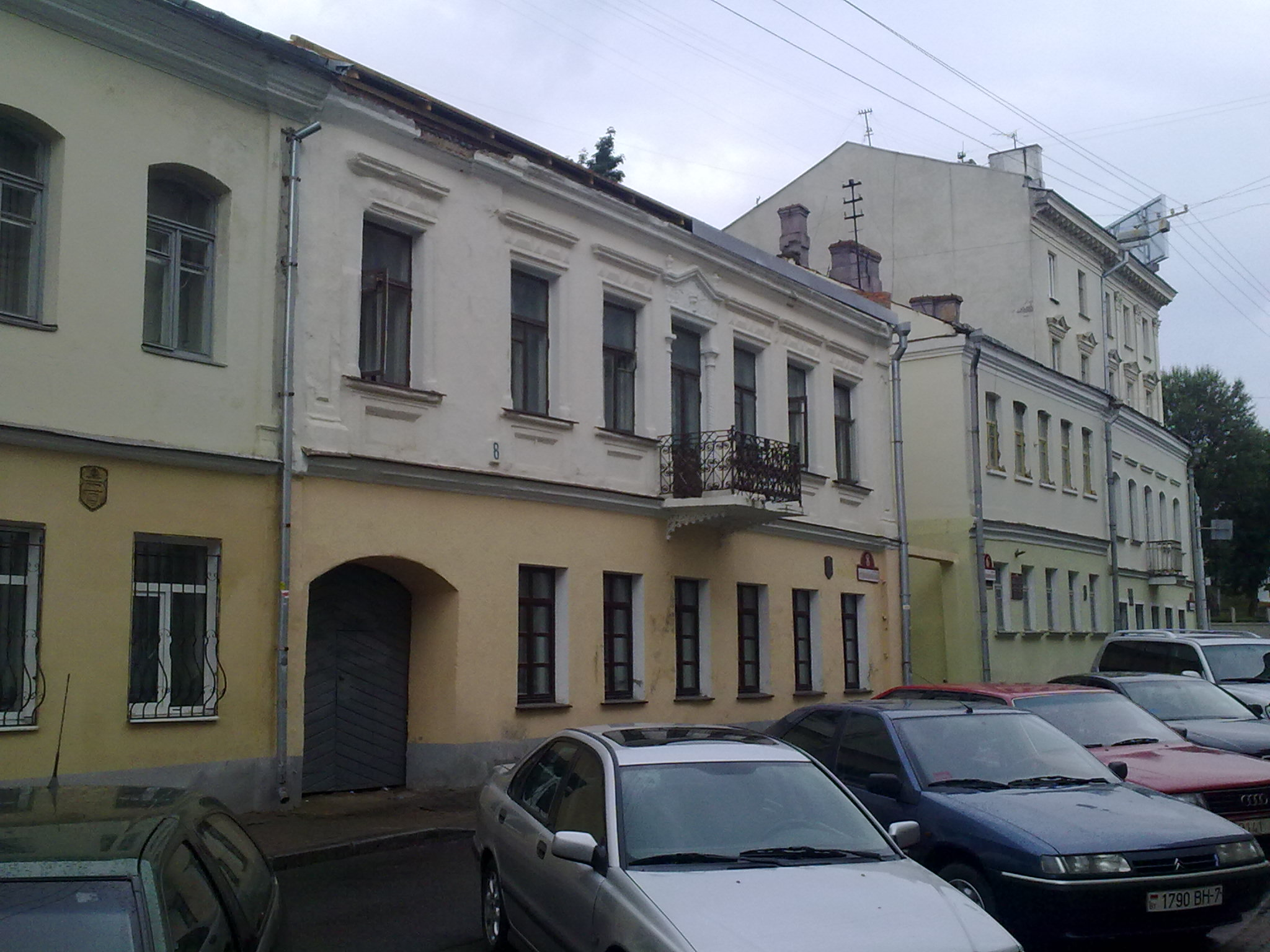 Мінск. Вуліца Інтэрнацыянальная. 2012